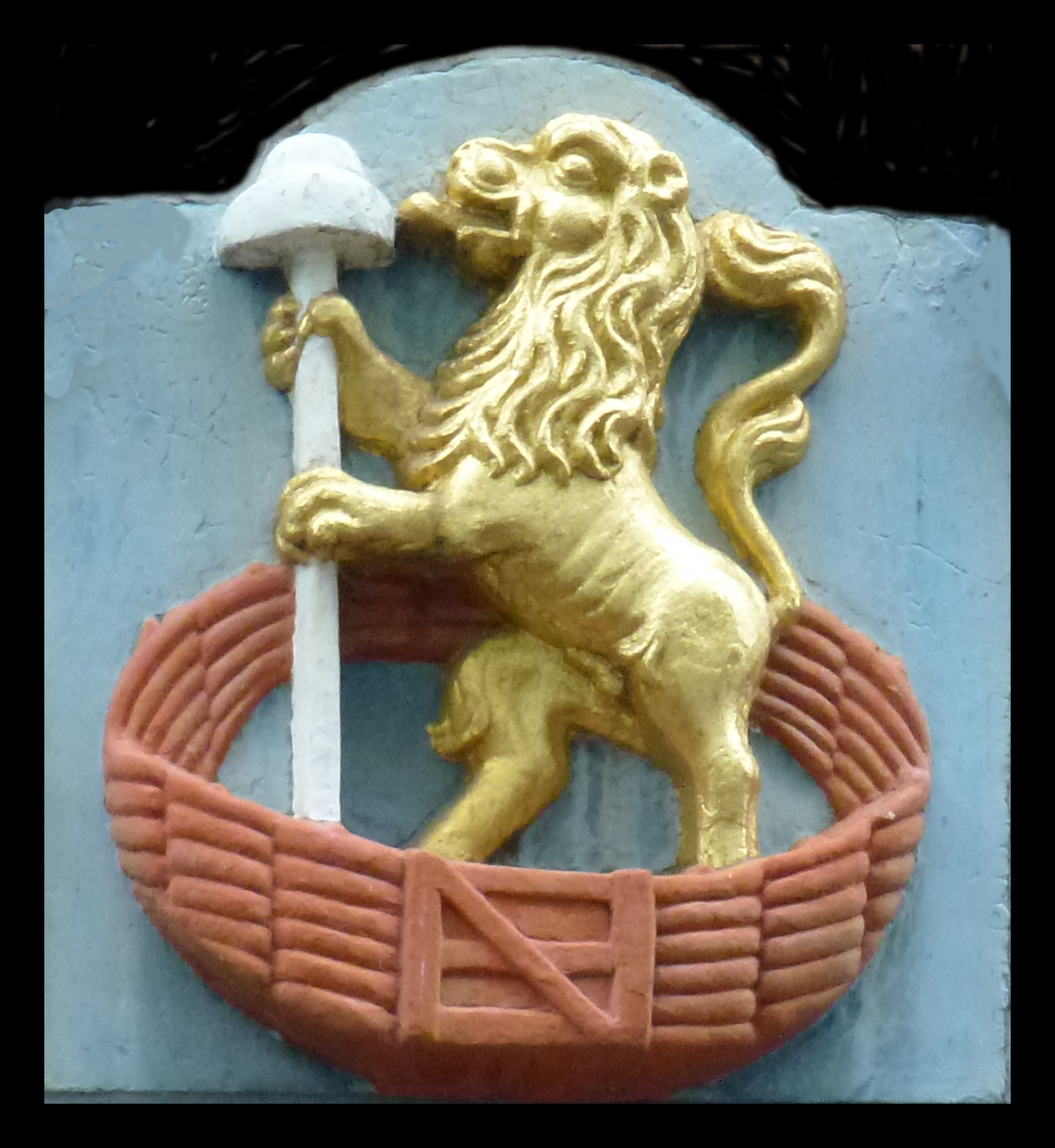 Gevelsteen: Leeuw in tuin van Holland. Betekenis: Verovering van het Slot Hagestein tijdens de Arkelse oorlog door Graaf Willem VI van Holland (de Gouden Hollandse Leeuw). De rode omheining (in oud hollands tuin) staat voor de aarden wal, bekleed met wilgentenen, ter bescherming van Slot Hagestein. (gepolychromeerd). Bron: Goudse gevelstenen, 2004, Theo de Jong